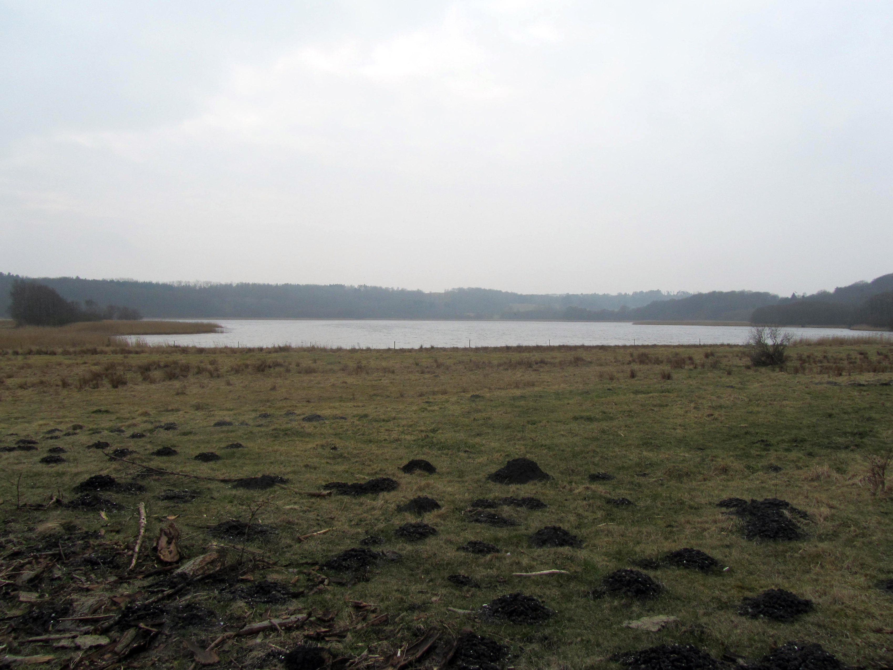 Kielstrup Sø set fra øst